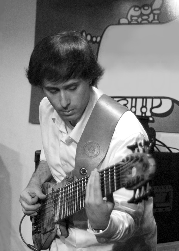 Igor Saavedra Valenzuela en Jazz & Pop julio 2010